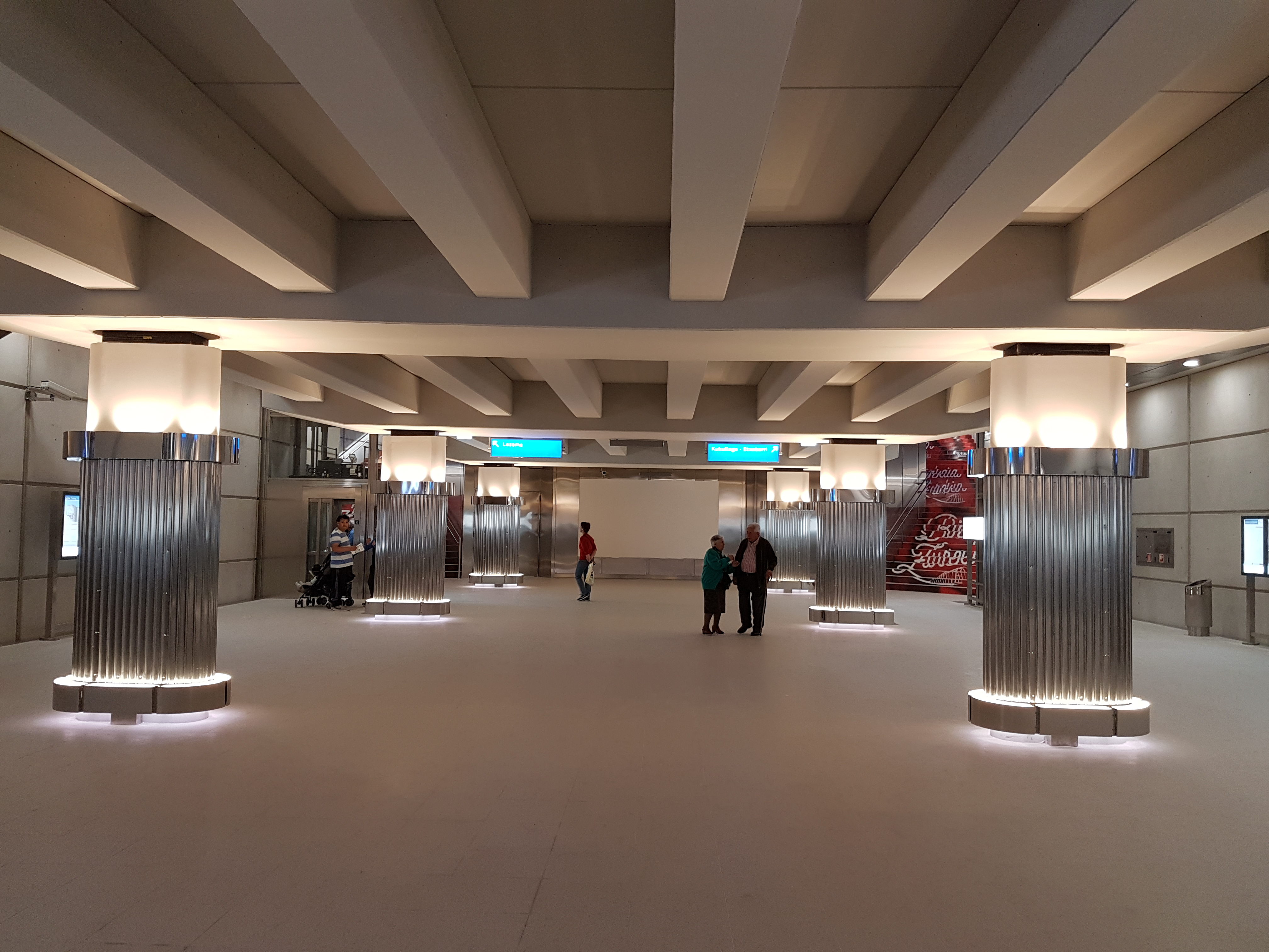 Estación de Zazpikaleak/Casco Viejo.